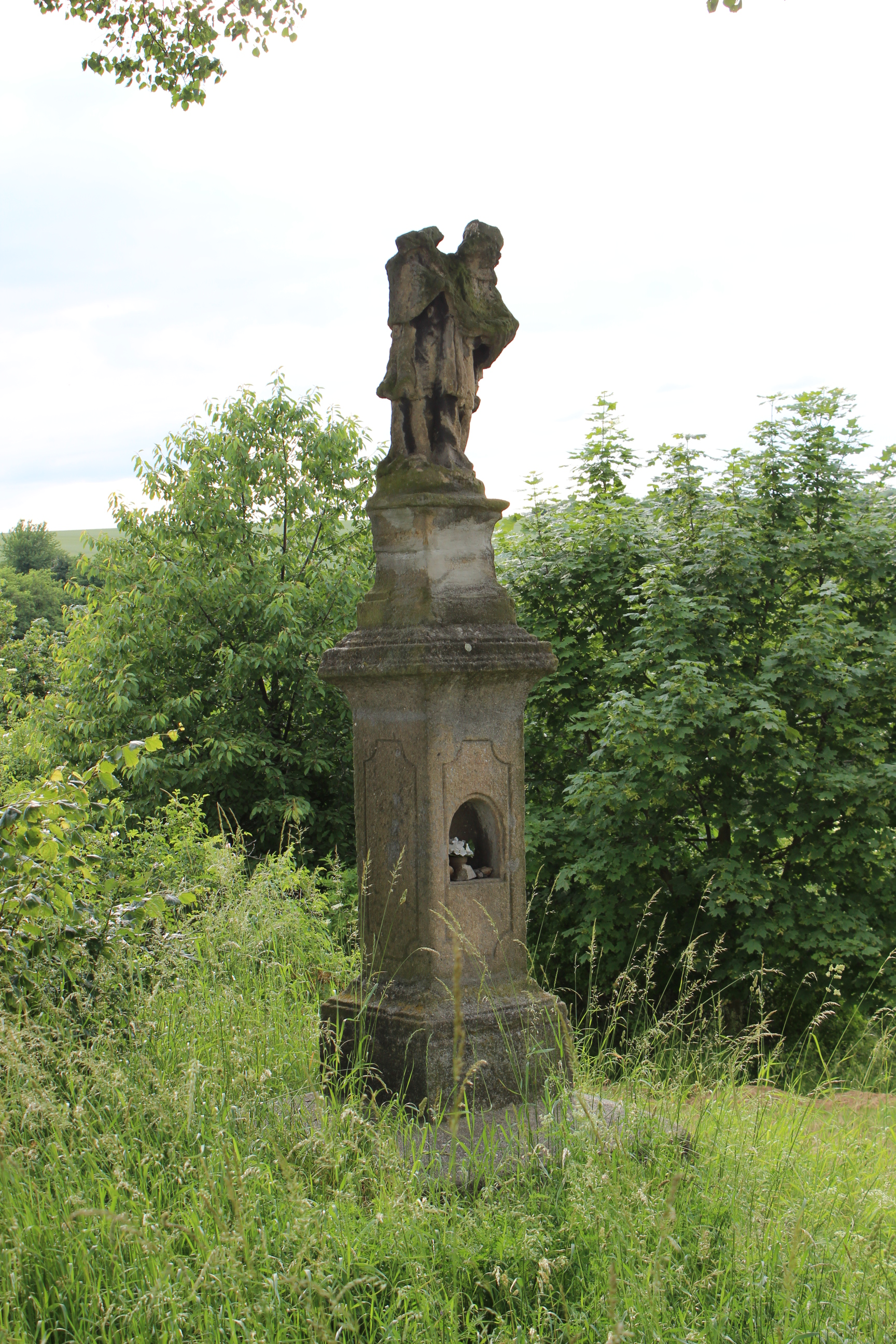 Socha svatého Jana Nepomuckého u Lašovic.